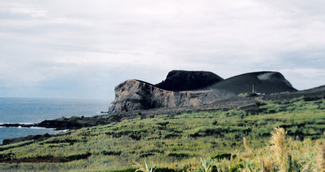 Vulcão dos Capelinhos; Fotografia tirada em Agosto de 2005.